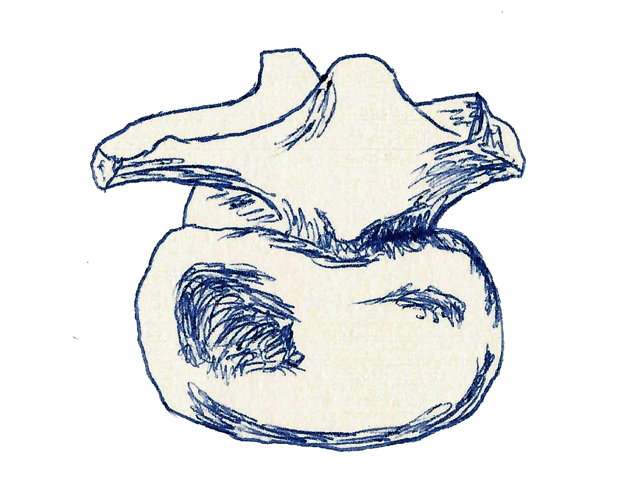 Illustration of a fossil of Coeluroides